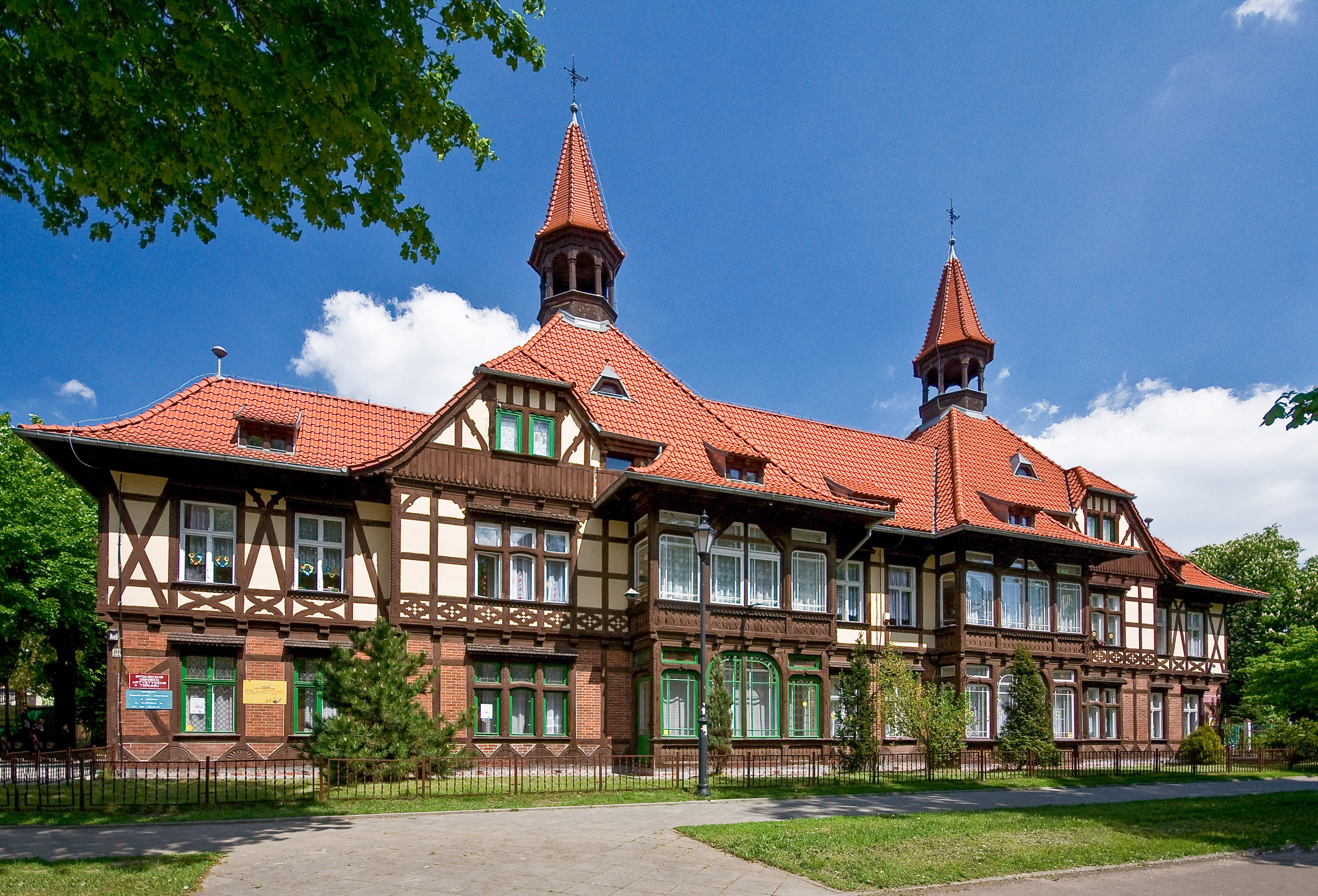 Toruń, dom, 1895